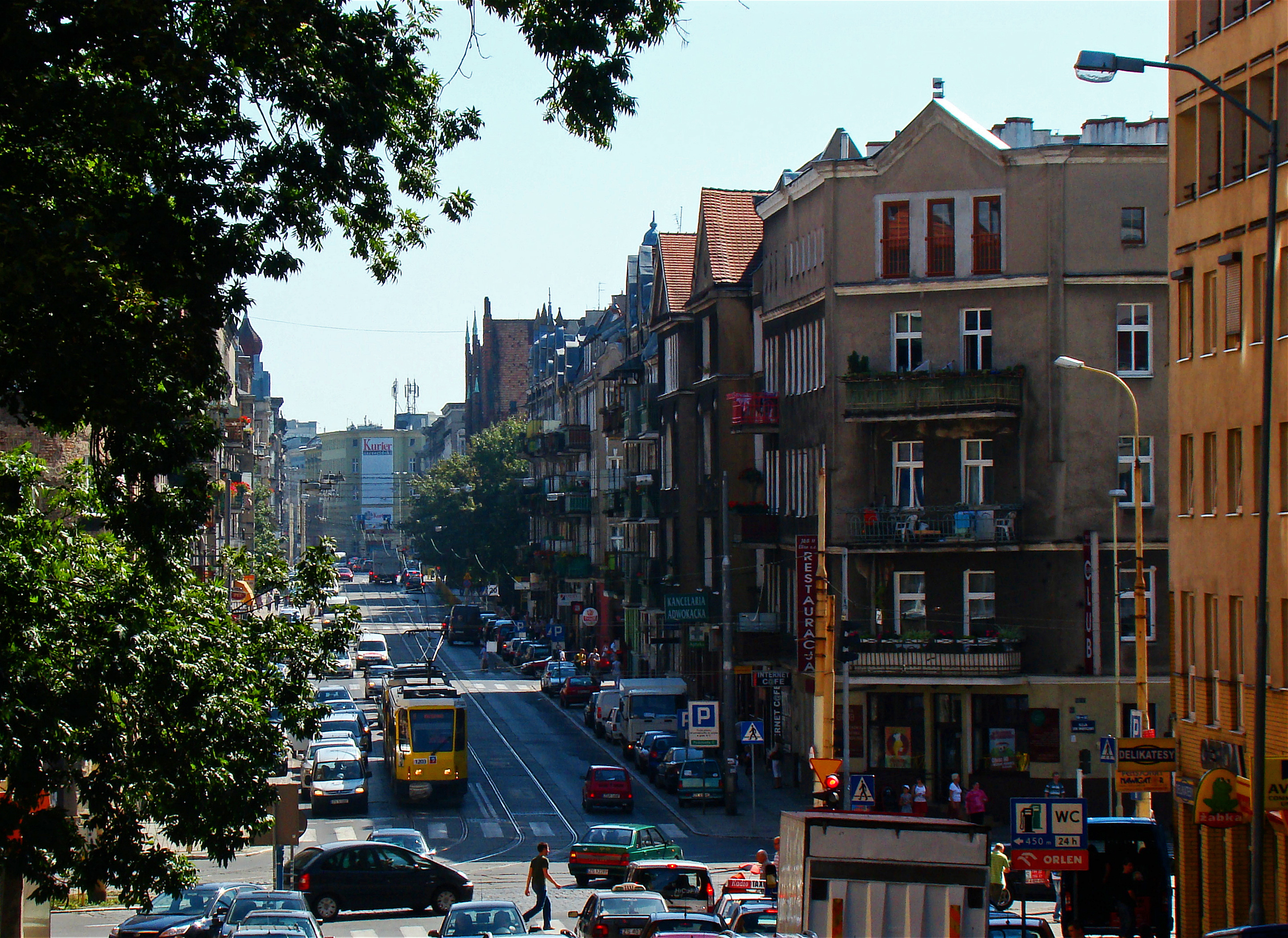 Szczecin-Turzyn (w osi ul. Jagiellońskiej), Polska